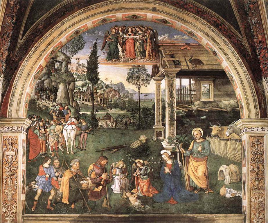 PINTURICCHIO Adoration of the Child Fresco Cappella Baglioni, Collegiata di Santa Maria Maggiore, Spello